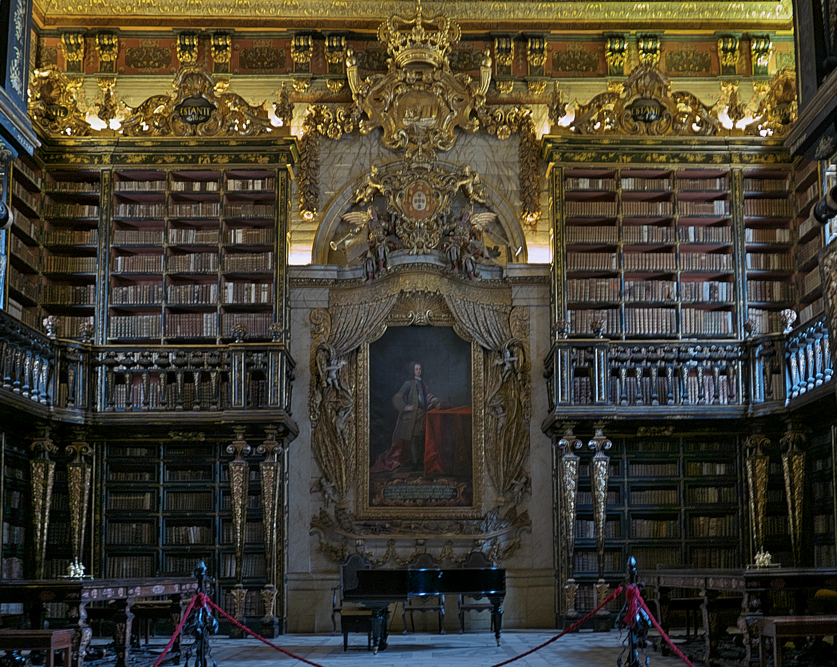 João V, artífice de la magnífica biblioteca.